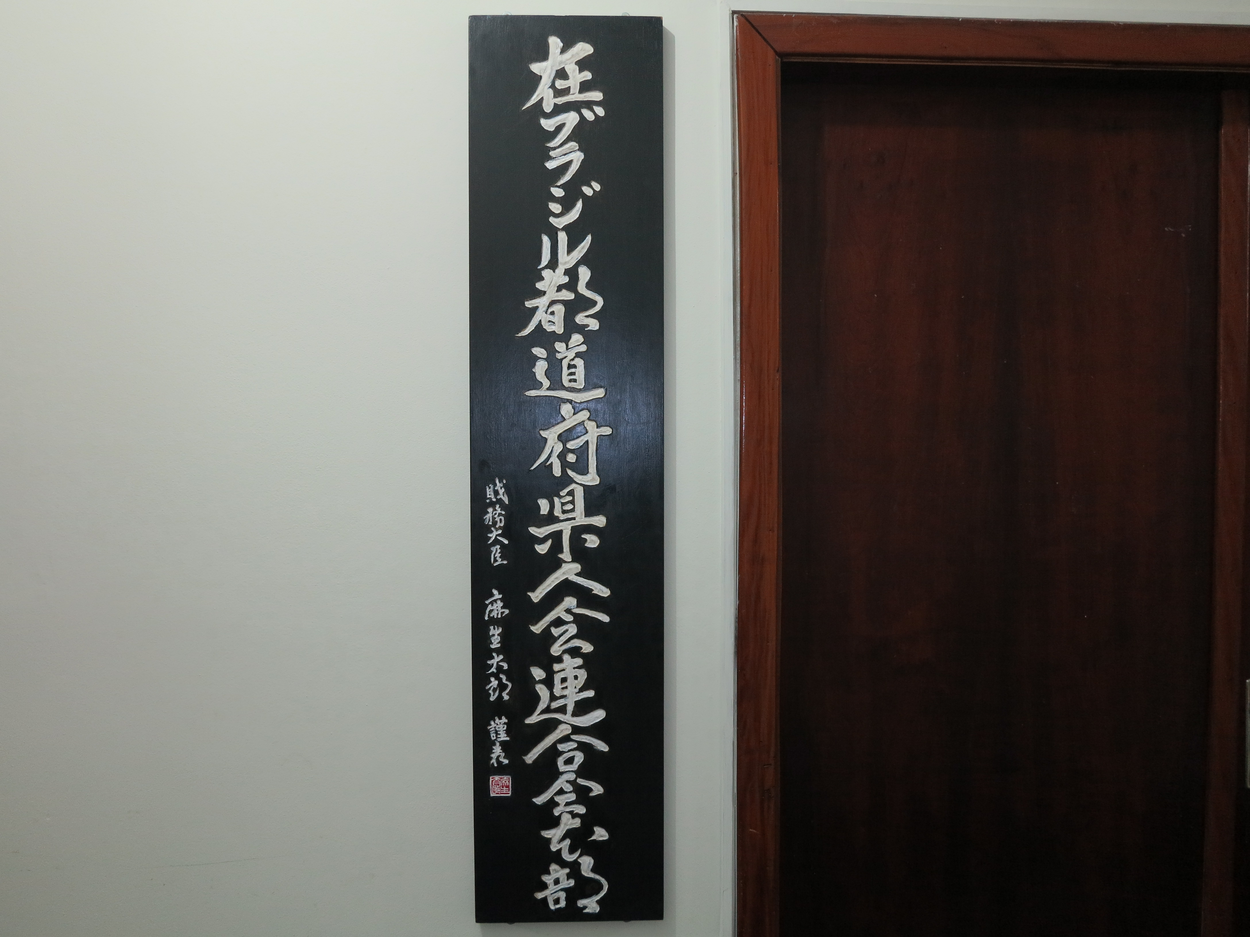 ブラジル日本都道府県人会連合会会議室前に掲げられた表札。 麻生太郎氏揮毫。